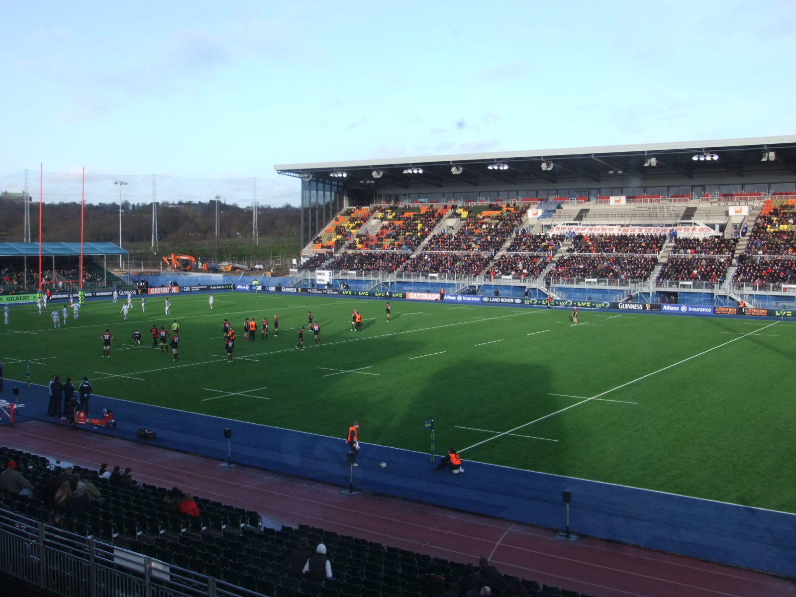 Allianz Park - Barnet